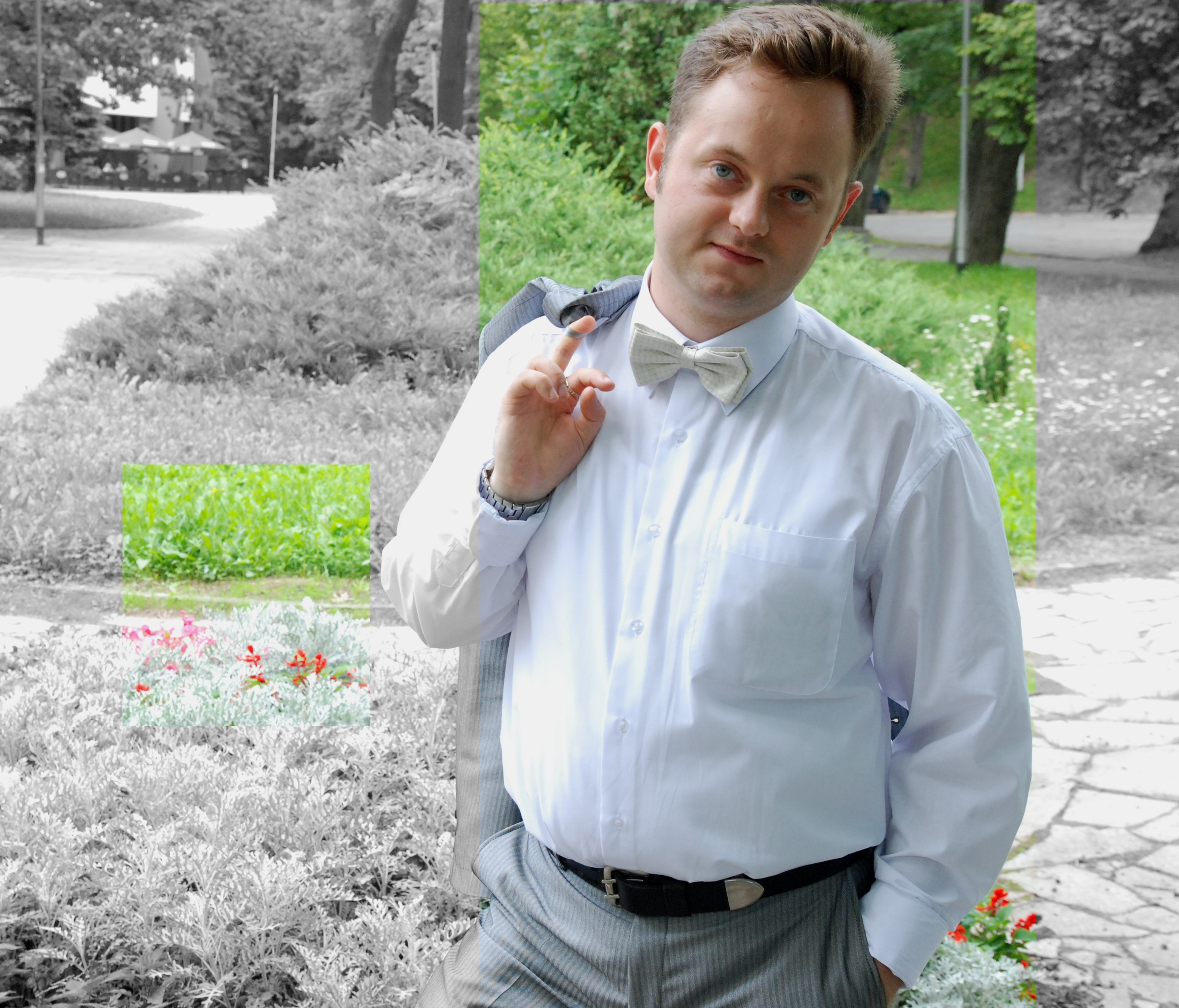 Festiwal Kultury Kresowej.